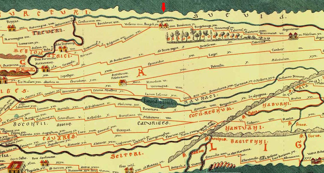 Lage von Moguntiaco (Mogontiacum) auf der Tabula Peutingerinana (roter Pfeil)